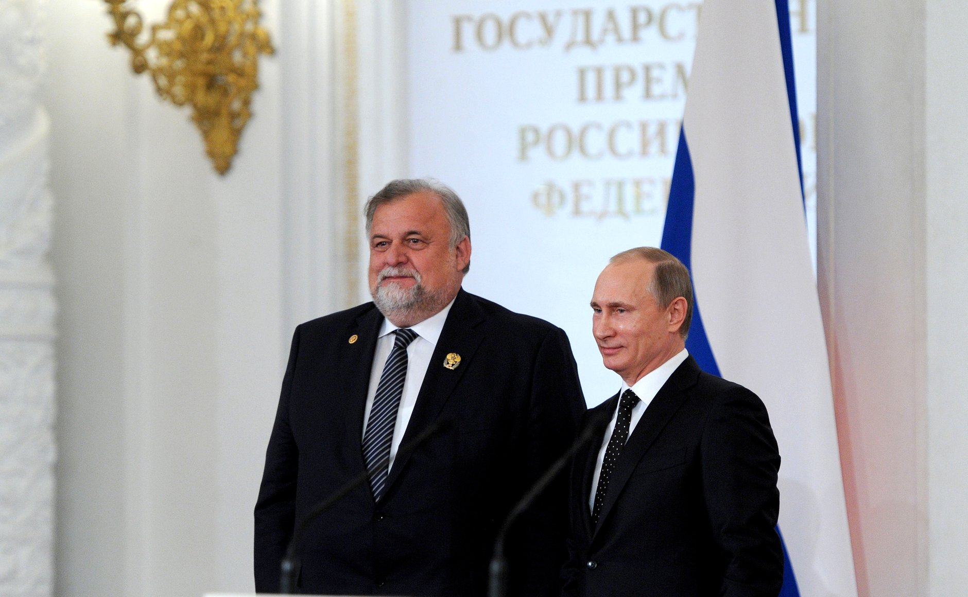 Вручение Государственных премий Российской Федерации за 2014 год. Вручение Государственных премий Российской Федерации. С лауреатом Государственной премии Российской Федерации в области науки и технологий Евгением Кабловым.